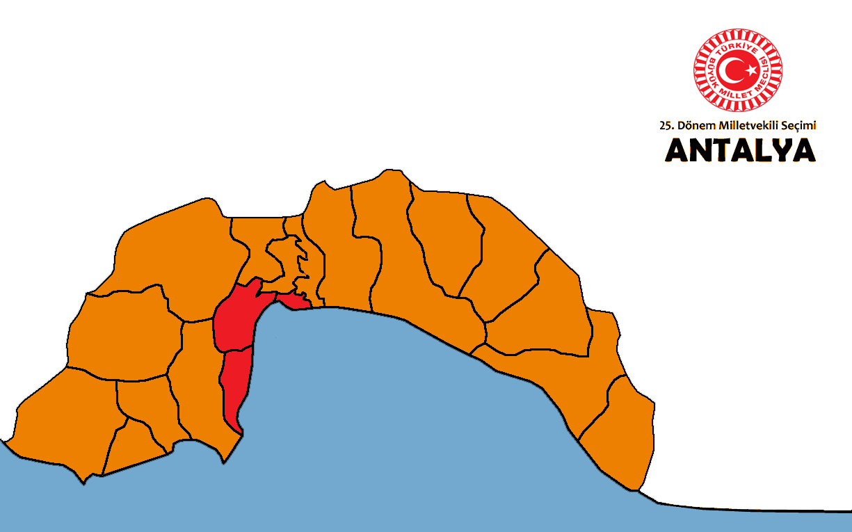 2015 genel seçim sonuçları